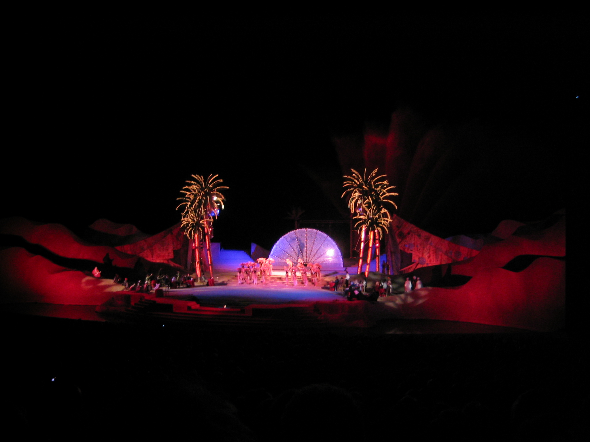 Aufführung von Giuditta bei den Seefestspielen Mörbisch 2003, gemeinfrei, selbstfotografiert